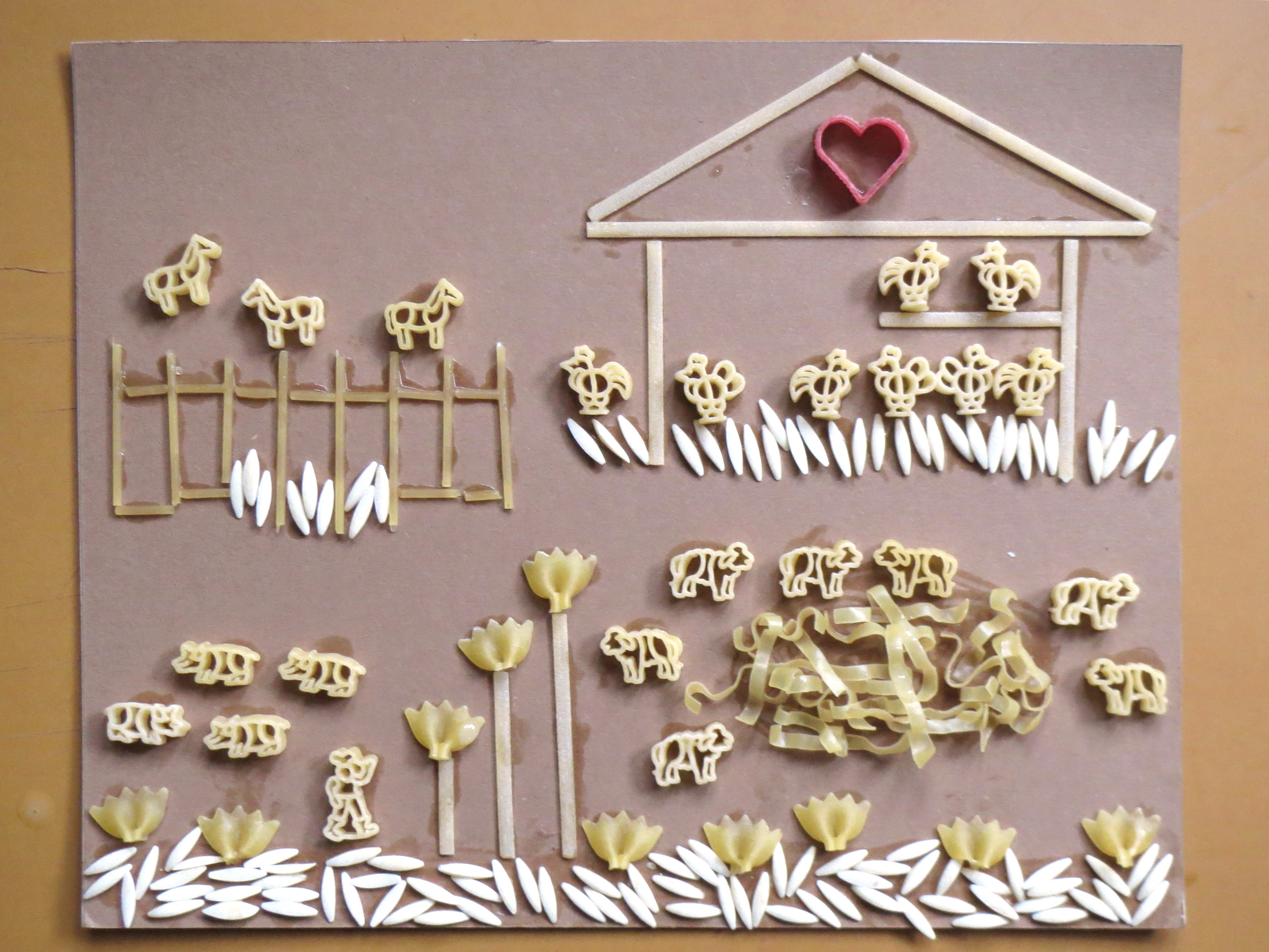 Nudelbild